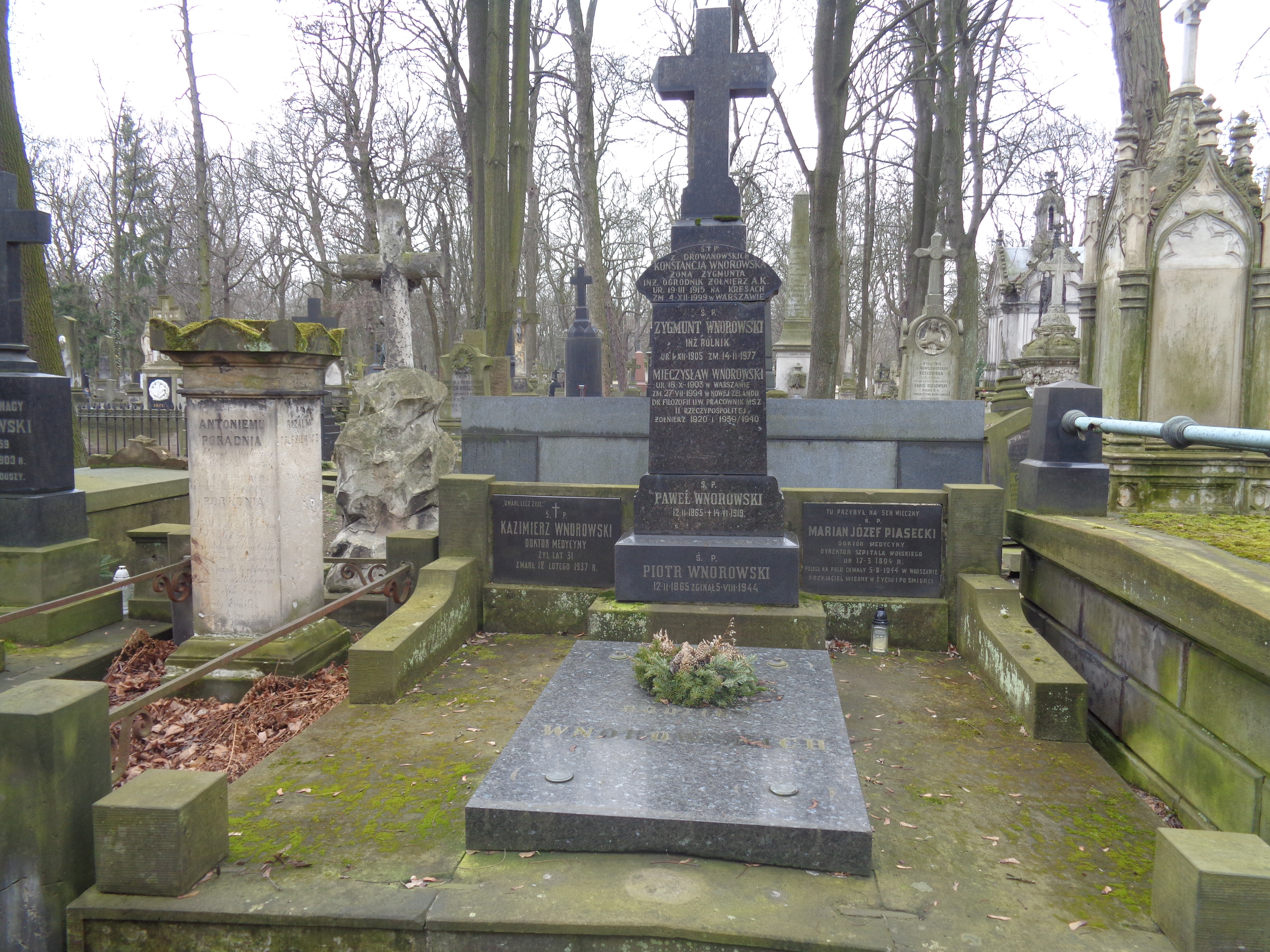 Grób Mariana Józefa Piaseckiego Cmentarzu Powązkowskim